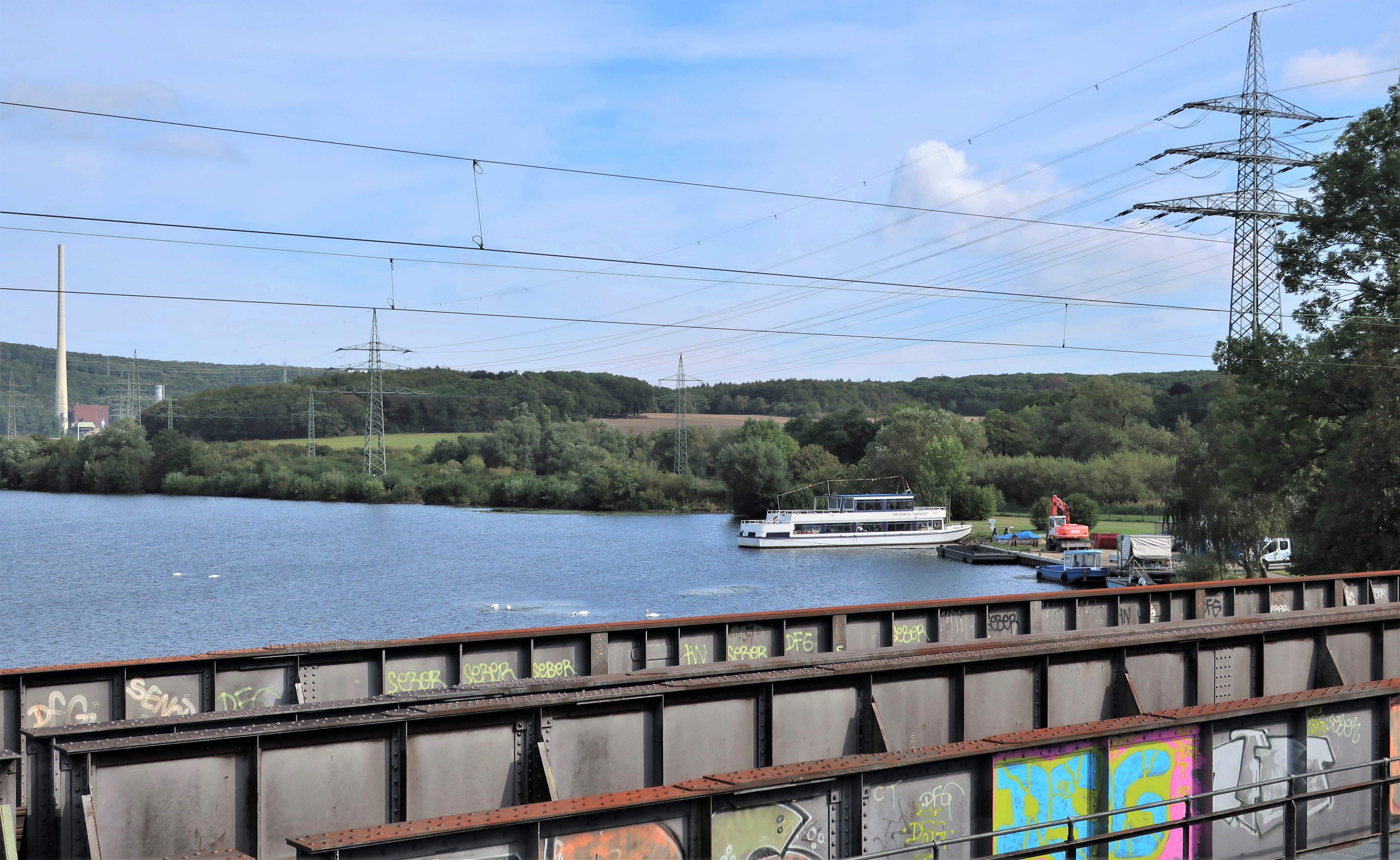 Blick von der Obergraben-/Ruhrbrücke in Wetter auf das Naturschutzgebiet HA-010 „Ehemaliger Yachthafen Harkortsee“ in Hagen-Vorhalle bei Werdringen. Links im Hintergrund das Cuno-Kraftwerk am Harkortsee.